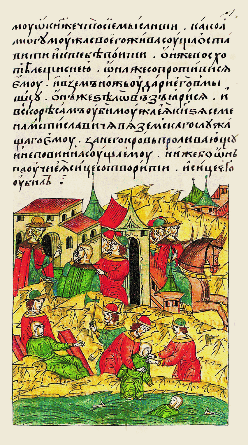 И великий князь Василий Дми- триевич сде- лал его наместником в Торжке, а он там безвинно убил служа- щего князя Семена Мстиславича Вязем- ского и его княгиню Иулианию, так как охваченный плотским желанием к его жене, взял ее к себе в дом, желая сожительство- вать с ней. Княгиня же, не желая этого, сказала [«О, князь, как ты думаешь, разве могу я оставить своего живого мужа и пойти к тебе?» Он же за- хотел лечь с ней, она сопротивляясь ему, схватила нож и ударила его в мышцу. Он раз- гневался и вскоре убил ее мужа князя Семена Мстиславича Вяземского, служащего у него, проливавшего за него кровь и ни в чем не виновного перед ним, так как не он научил жену так по- ступить с князем И повелел отсечь княгине руки и ноги и бро- сить в воду. Слуги сделали приказанное им, бросили ее в воду, стало это грехом и великим стыдом для князя Юрия, не желая переносить своего несчастья и стыда, и бесчестия, бежал он в Орду.]